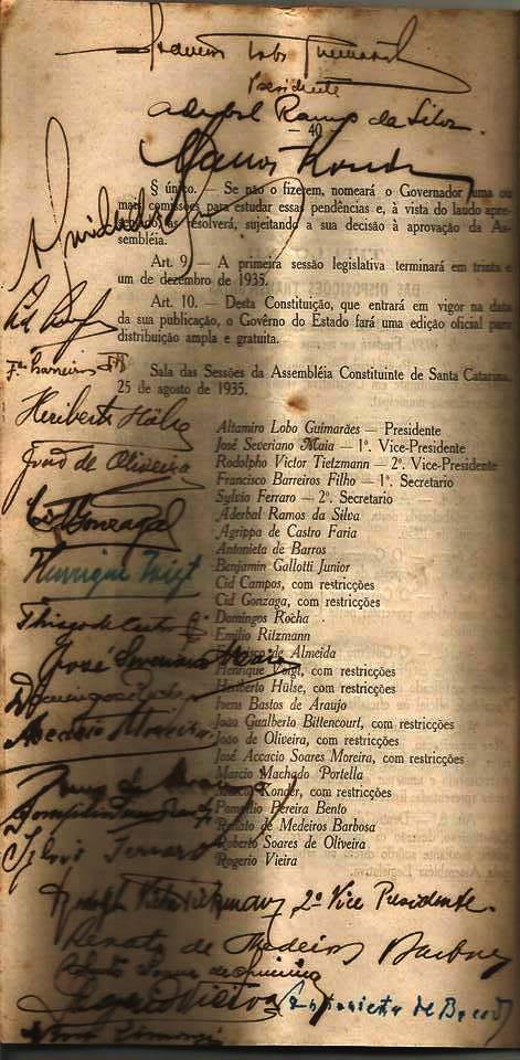 Deputados que promulgaram a Constituição do Estado de Santa Catarina em 1935.